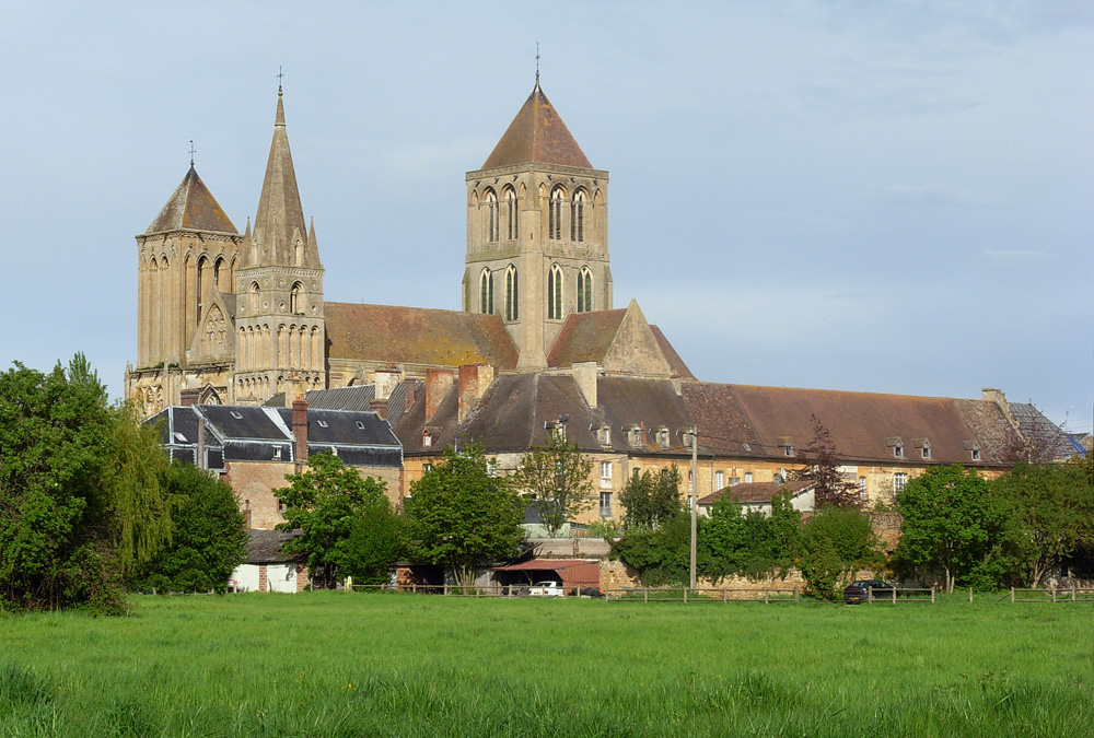 Abbaye bénédictine de saint-Pierre-sur-Dives. Vue d'ensemble côté sud.